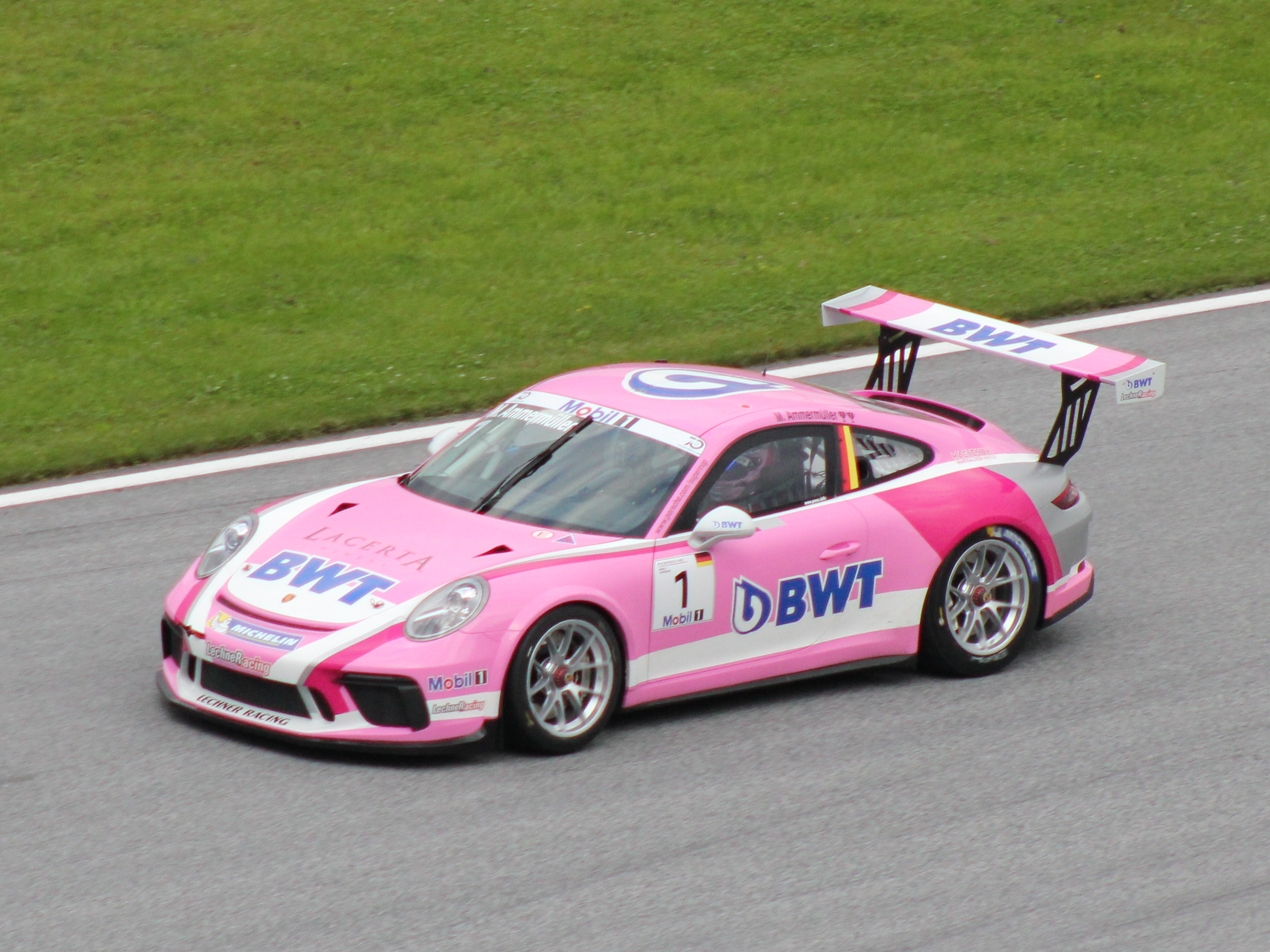 1 Michael Ammermüller beim Rennwochenende in Österreich 2018